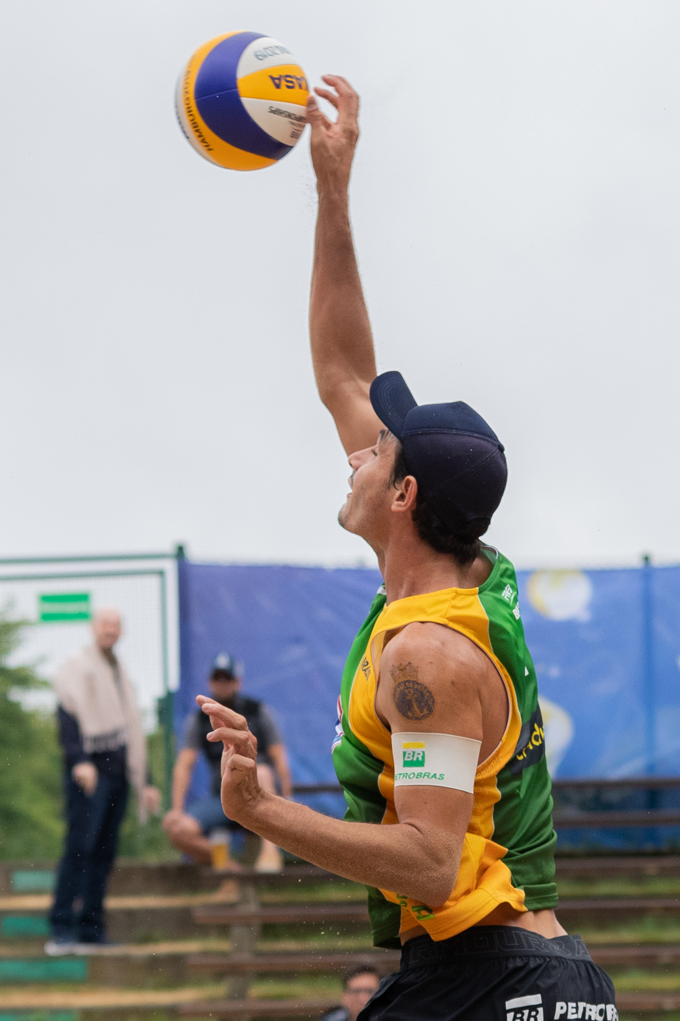 BeachVolleyball Weltmeisterschaft Hamburg 2019; Andre Loyola Stein (BRA, Brasilien)